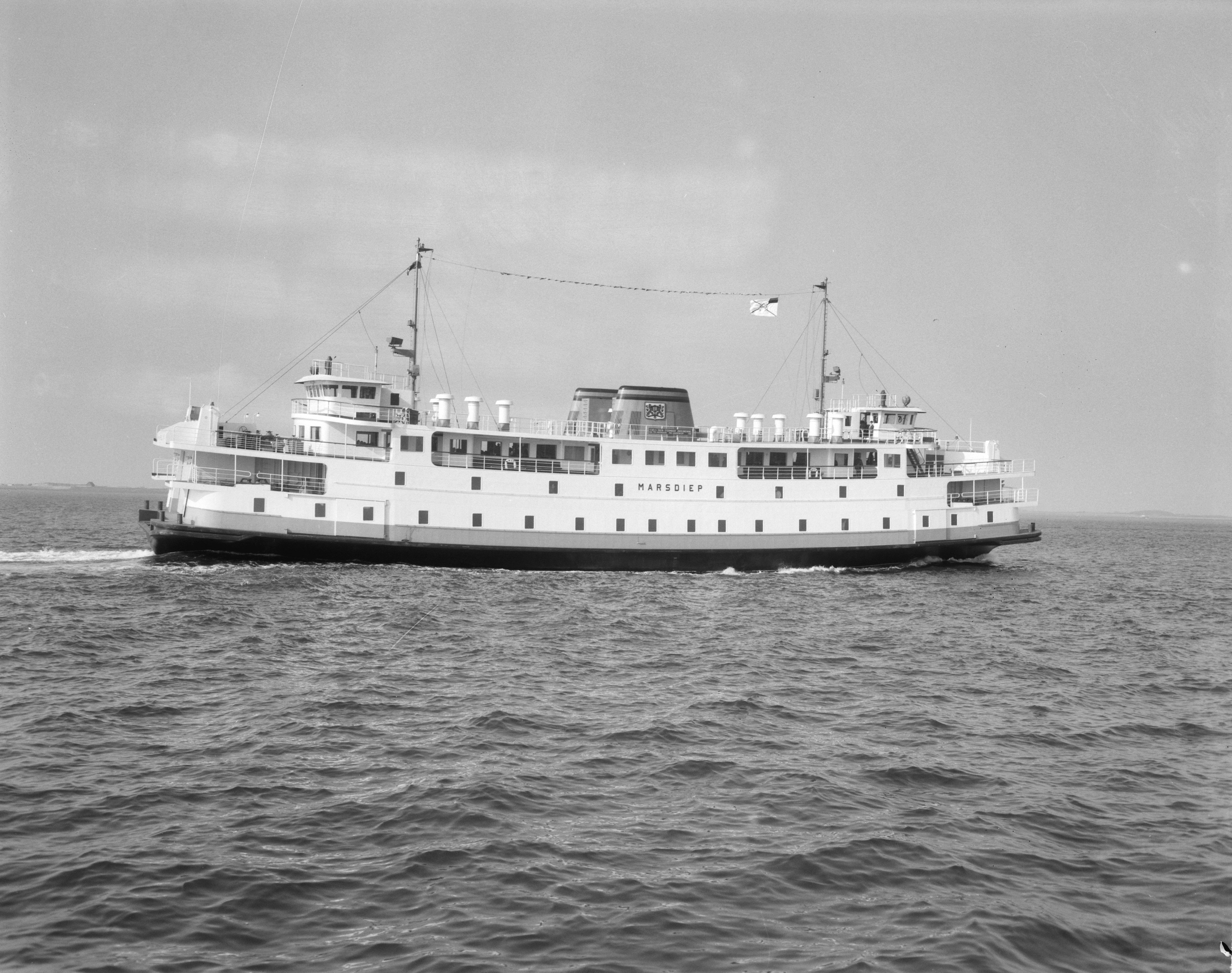 Collectie / Archief : Fotocollectie Anefo Reportage / Serie : [ onbekend ] Beschrijving : Opdracht Zaanlandse Scheepsbouw Mij de Marsdiep tijdens proefvaart Datum : 18 maart 1964 Trefwoorden : Proefvaarten Instellingsnaam : Zaanlandse Scheepsbouw Maatschappij Fotograaf : Bilsen, Joop van / Anefo Auteursrechthebbende : Nationaal Archief Materiaalsoort : Negatief (zwart/wit) Nummer archiefinventaris : bekijk toegang 2.24.01.04 Bestanddeelnummer : 916-1914